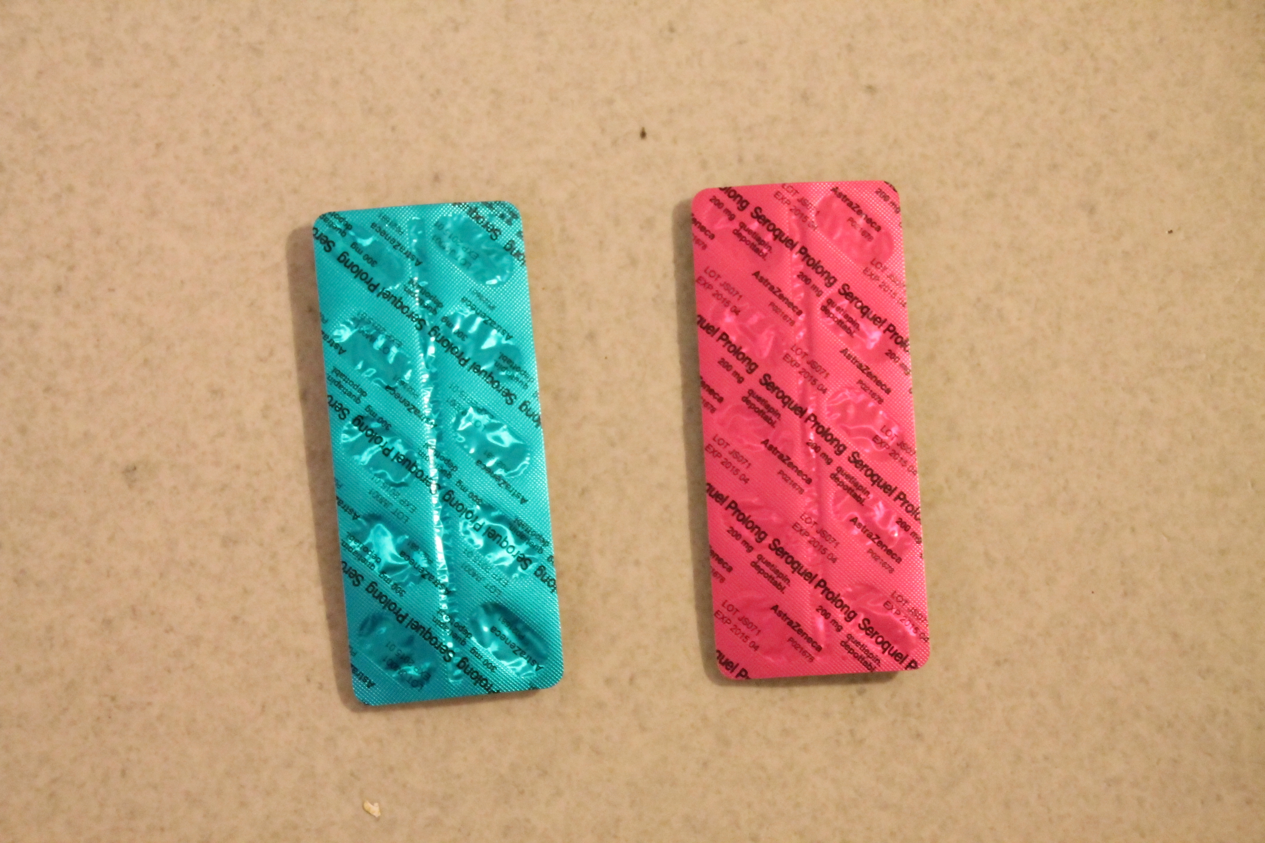 Seroquel Prolong (ketiapiini, depottabletti) 300 ja 200 mg -lääkelevyjä.